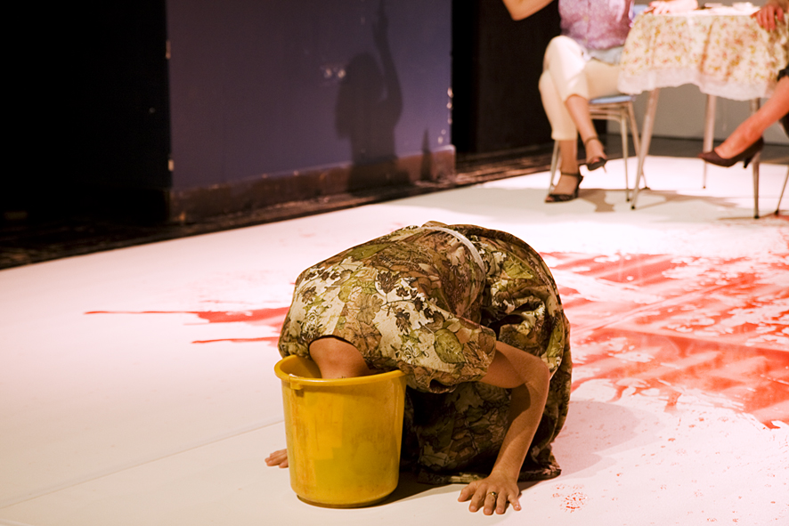 העצב של השכן עמוק יותר (2011). תיאטרון חזותי, במאית וכוריאוגרפית עמנואלה עמיחי